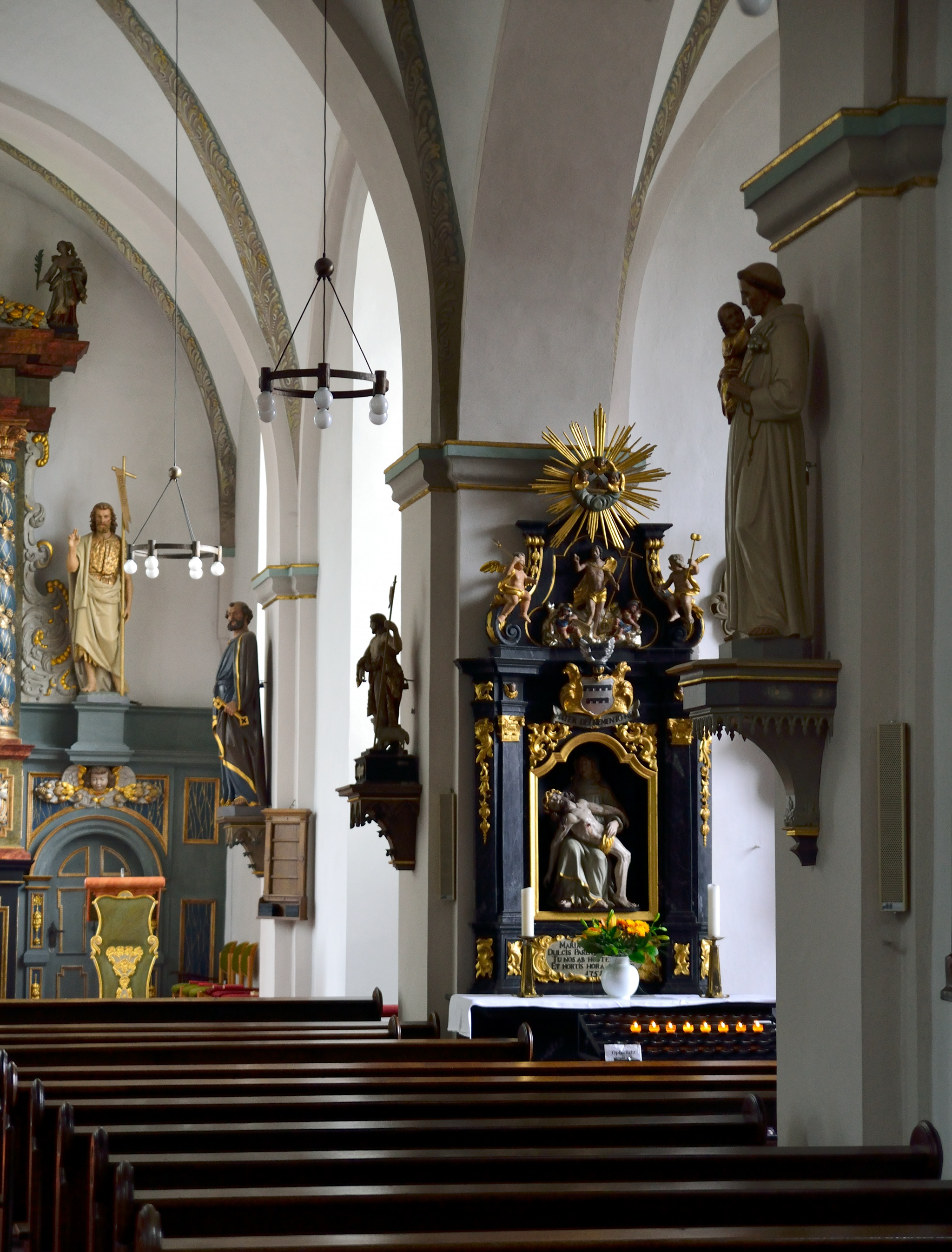 This is a photograph of an architectural monument. Katholische Pfarrkirche St. Johannes Baptist in Steinheim-Vinsebeck